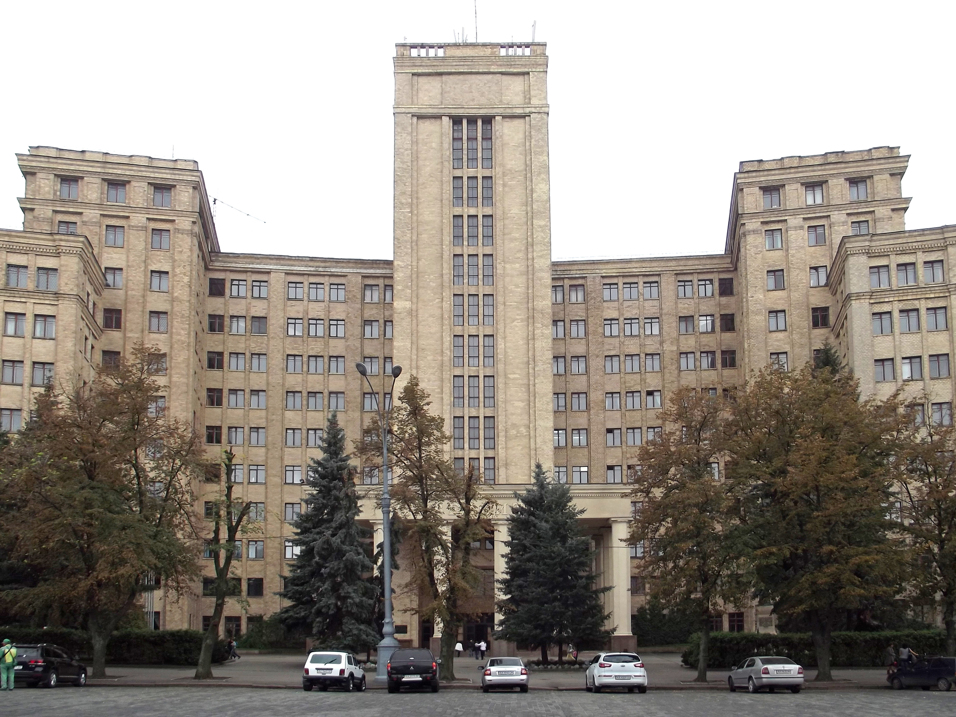 Университет в Харькове